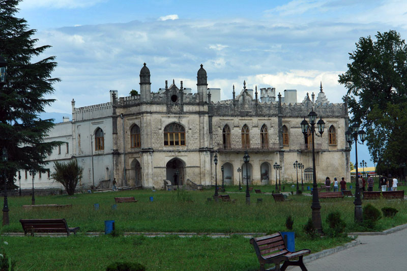 The Dadiani Palace Museum in Zugdidi, Samegrelo Region, Georgia.